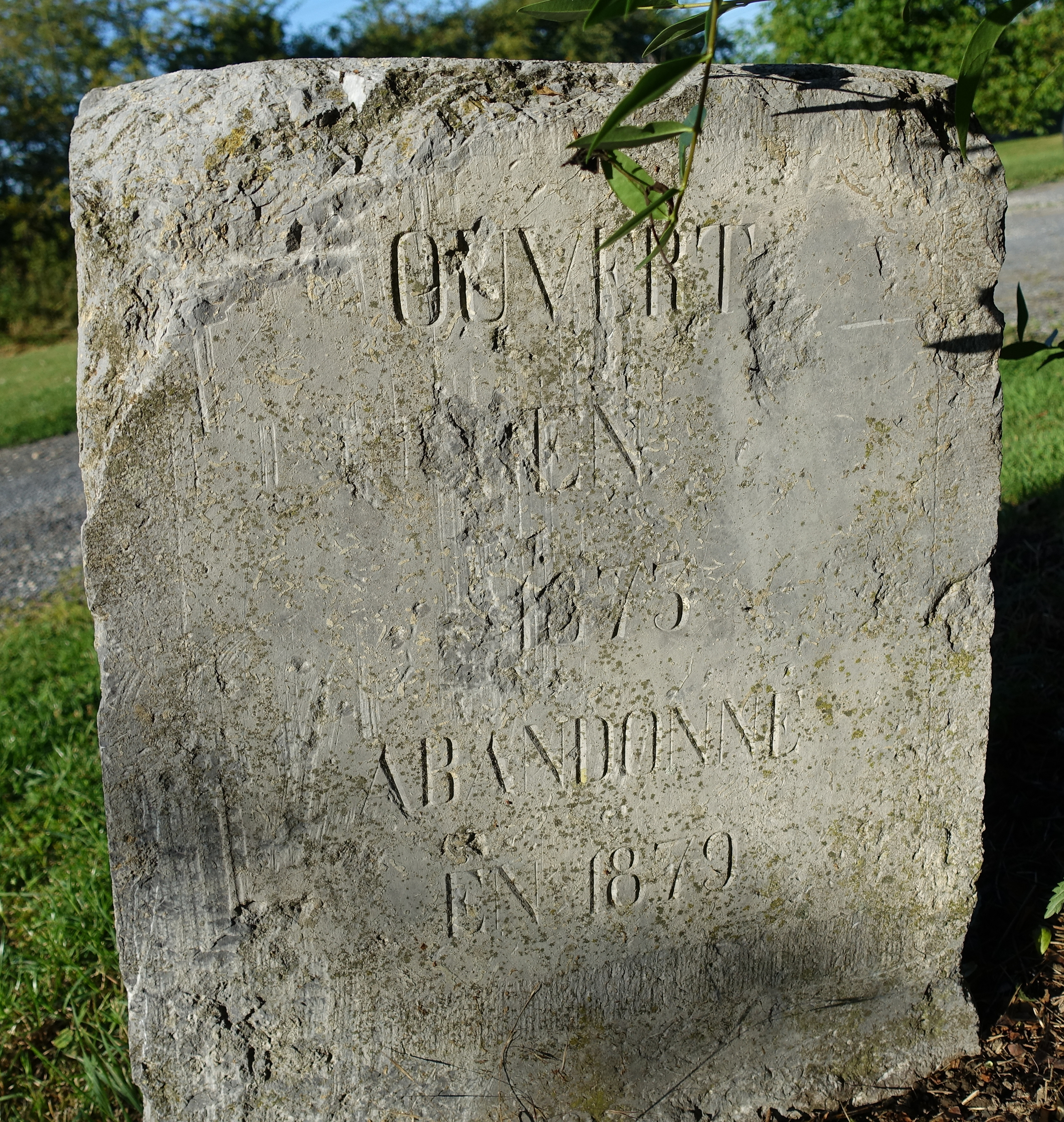 St Hadelin Puits 2 - Inscription: Ouvert en 1875 abandonnée en 1879